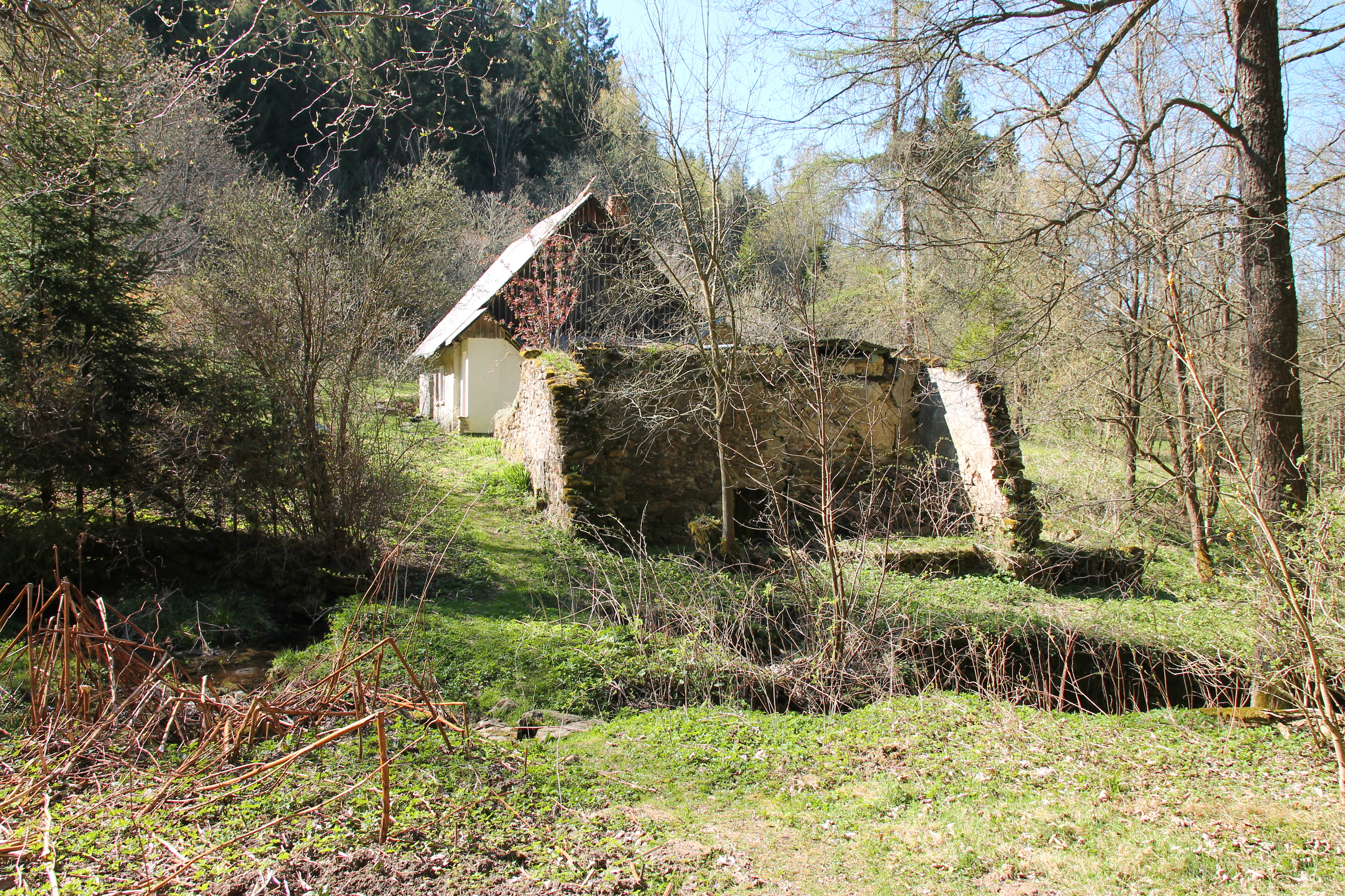 Horní chalupa v Růždí